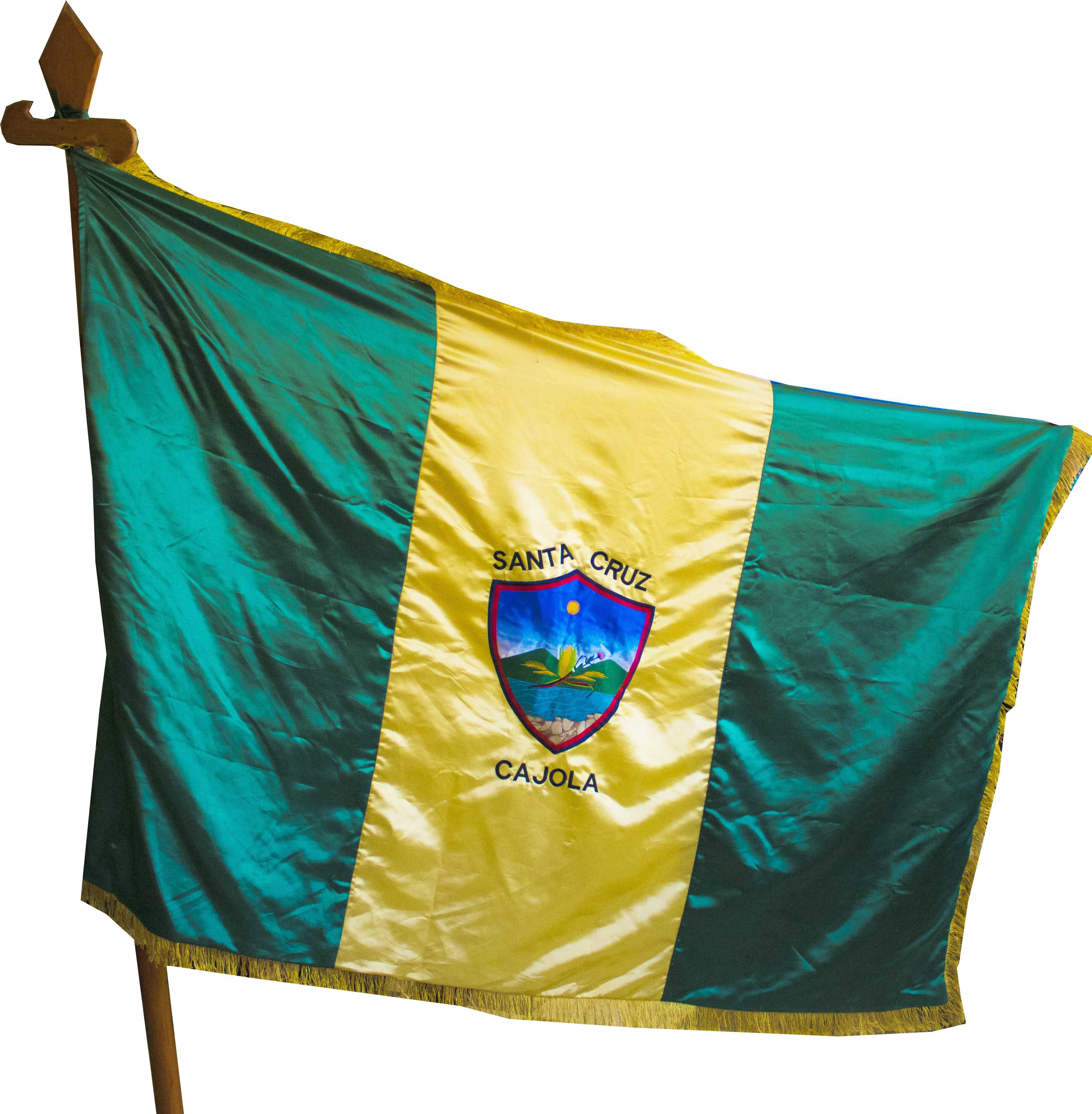 BANDERA DEL MUNICIPIO DE CAJOLA